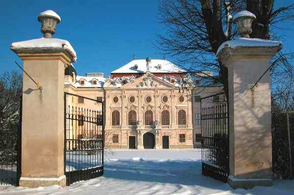 Beschreibung: Schloss Riegersburg in Niederösterreich Quelle: selbst fotografiert Fotograf oder Zeichner: GuentherZ Datum: Jänner 2003 Andere Versionen